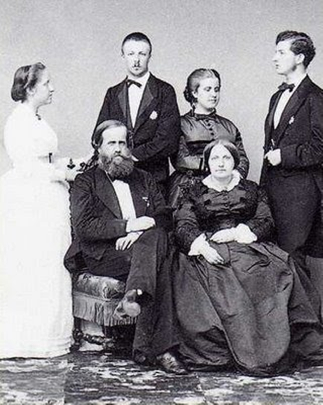 Família Imperial do Brasil (a partir da esquerda: Princesa Imperial Dona Isabel (1846-1921), Imperador Dom Pedro II (1825-1891); Príncipe Dom Luís Felipe de Orléans, Conde d'Eu (1842-1922); Imperatriz Dona Teresa Cristina (1822–1889); Princesa Dona Leopoldina (1847-1871); Príncipe Luís Augusto de Saxe-Coburgo-Kohary, Duque de Saxe (1845-1907))